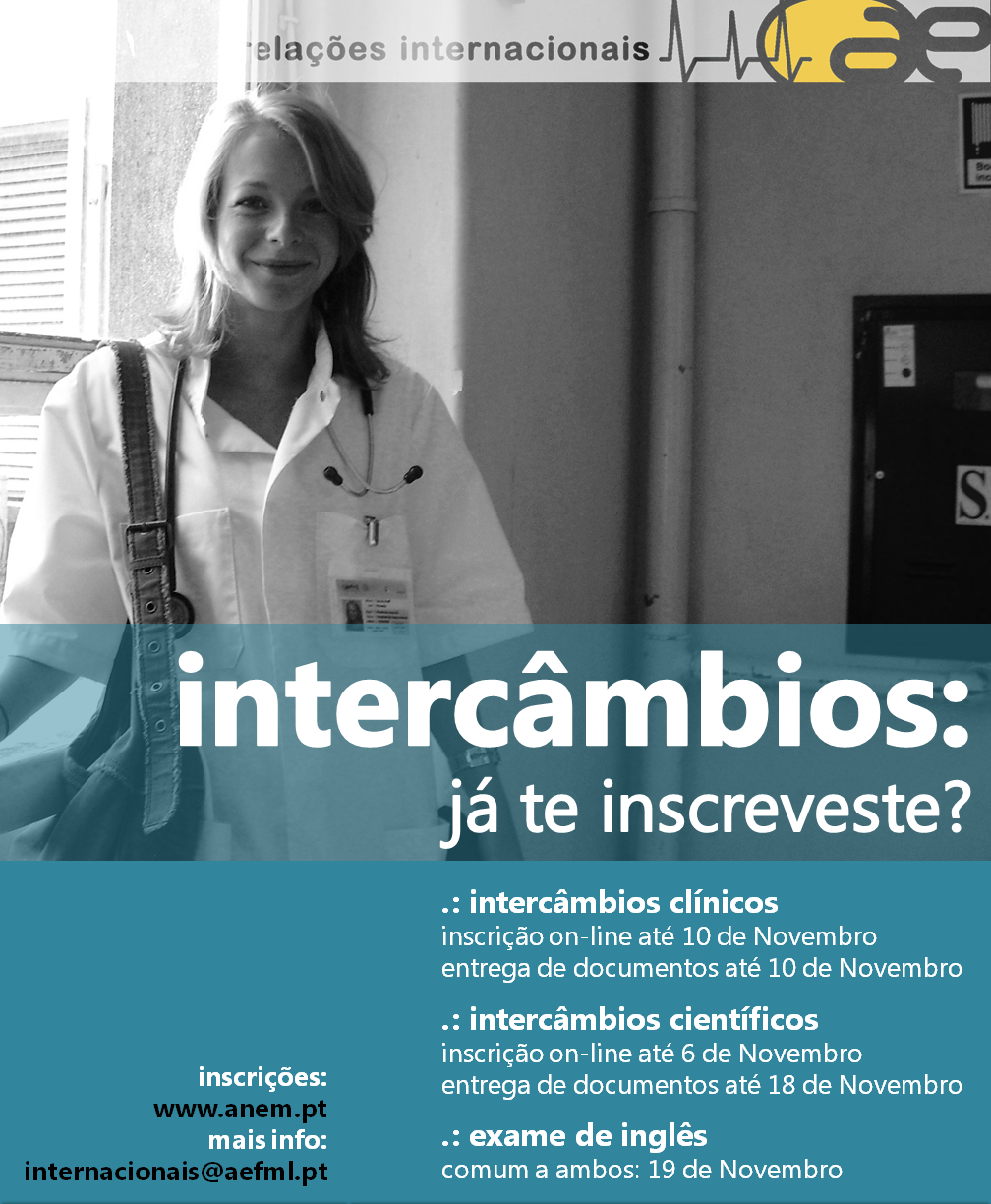 Intercâmbios 2008 AEFML